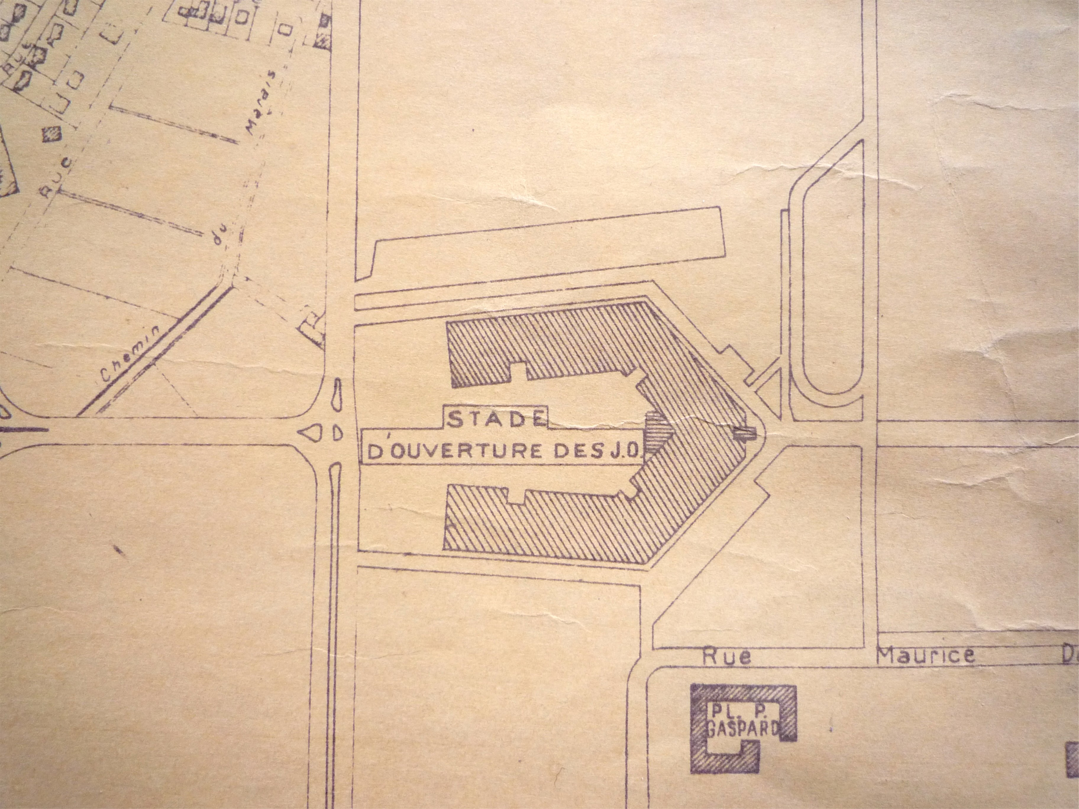 Extrait plan de 1968 : Stade olympique provisoire de Grenoble.